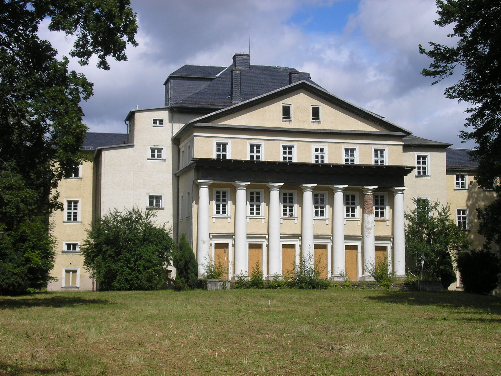 Parkansicht von Schloss Ebersdorf (Thüringen).